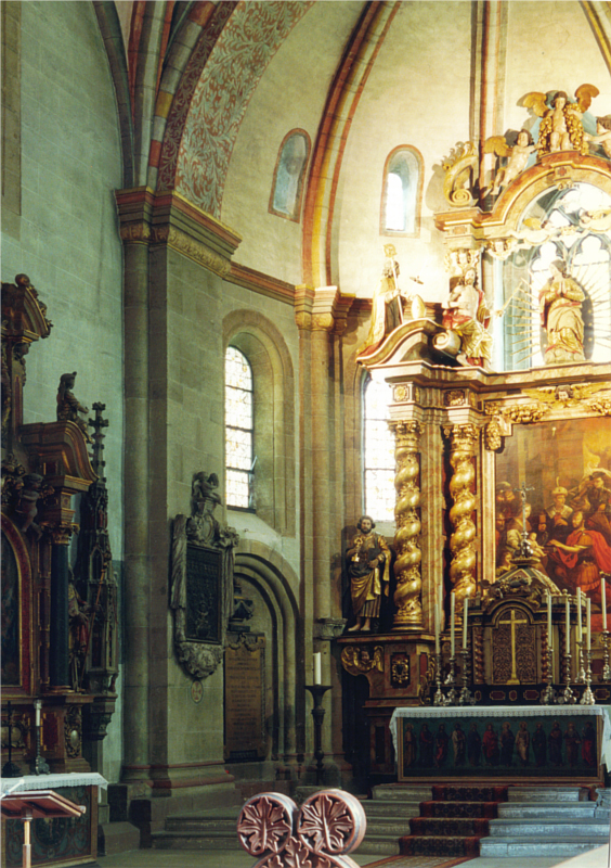 Fritzlar Dom St. Peter, Innenraum, spätromanischer Chor nach Osten gesehen